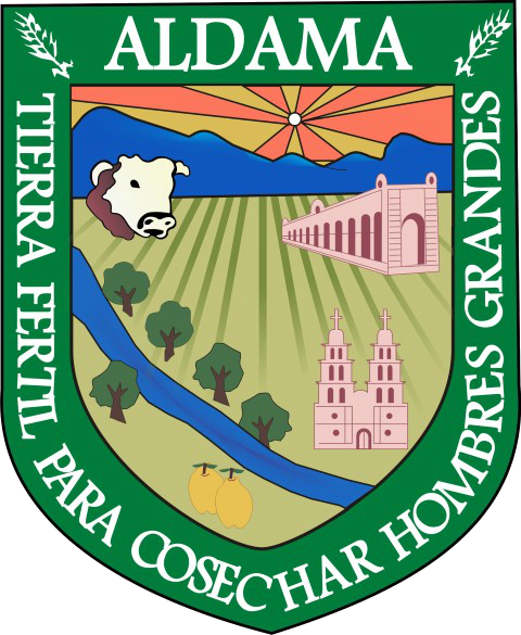 Escudo de Aldama